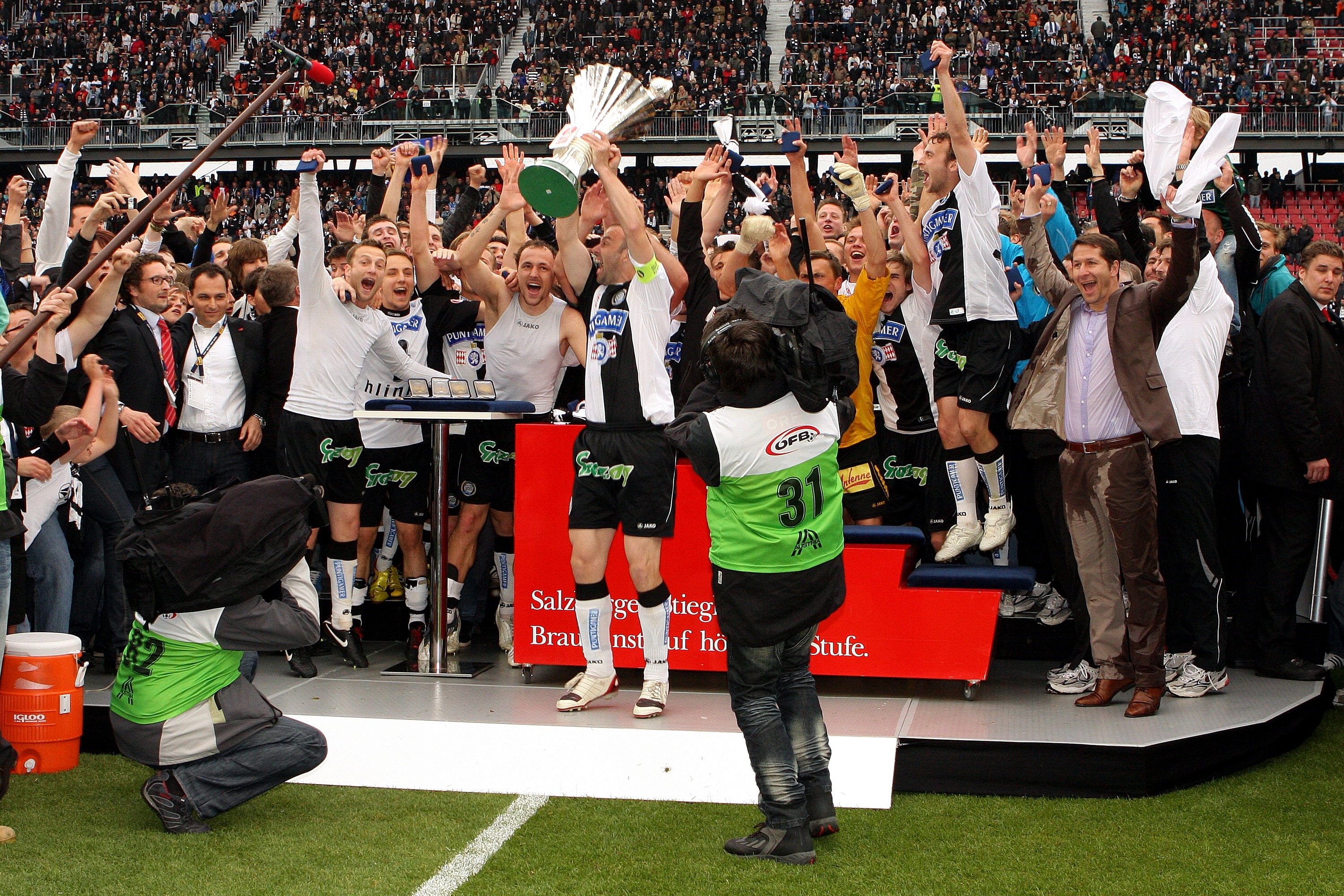 Endspiel im Österreichischer Fußball-Cup 2009/10 SC Magna Wiener Neustadt gegen SK Sturm Graz 0:1 (0:0) am 16. Mai 2010 im Wörtherseestadion in Klagenfurt - Die Spieler des SK Sturm Graz jubeln über den Sieg im ÖFB-Cup 2010. Kapitän Mario Haas stemmt den Siegerpokal in die Höhe. (Bild 1)